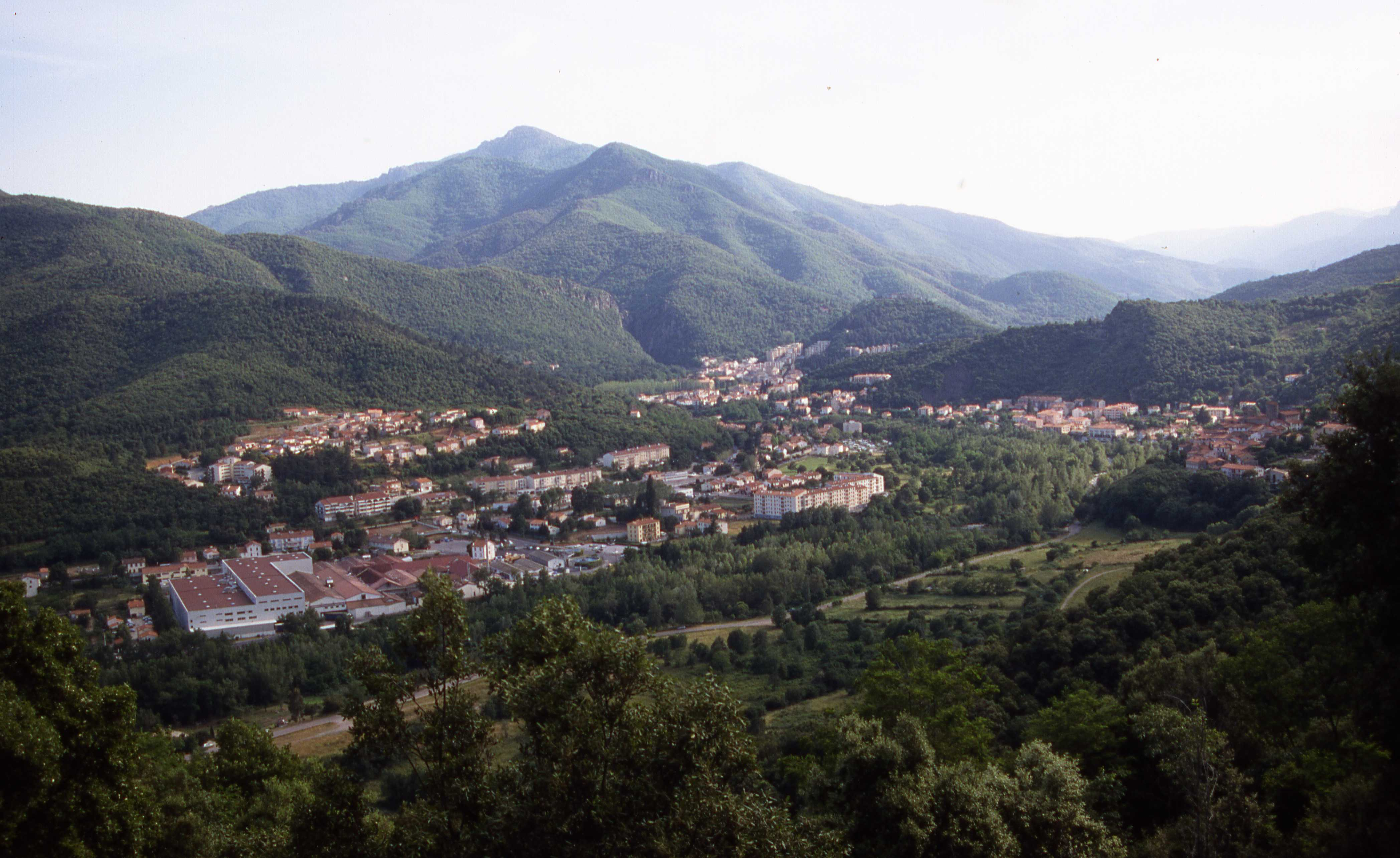 Vue générale d'Amélie-les-Bains et du pic du Canigou (erreur, voir plus bas) Amélie-les-Bains-Palalda, Pyrénées-Orientales, France.